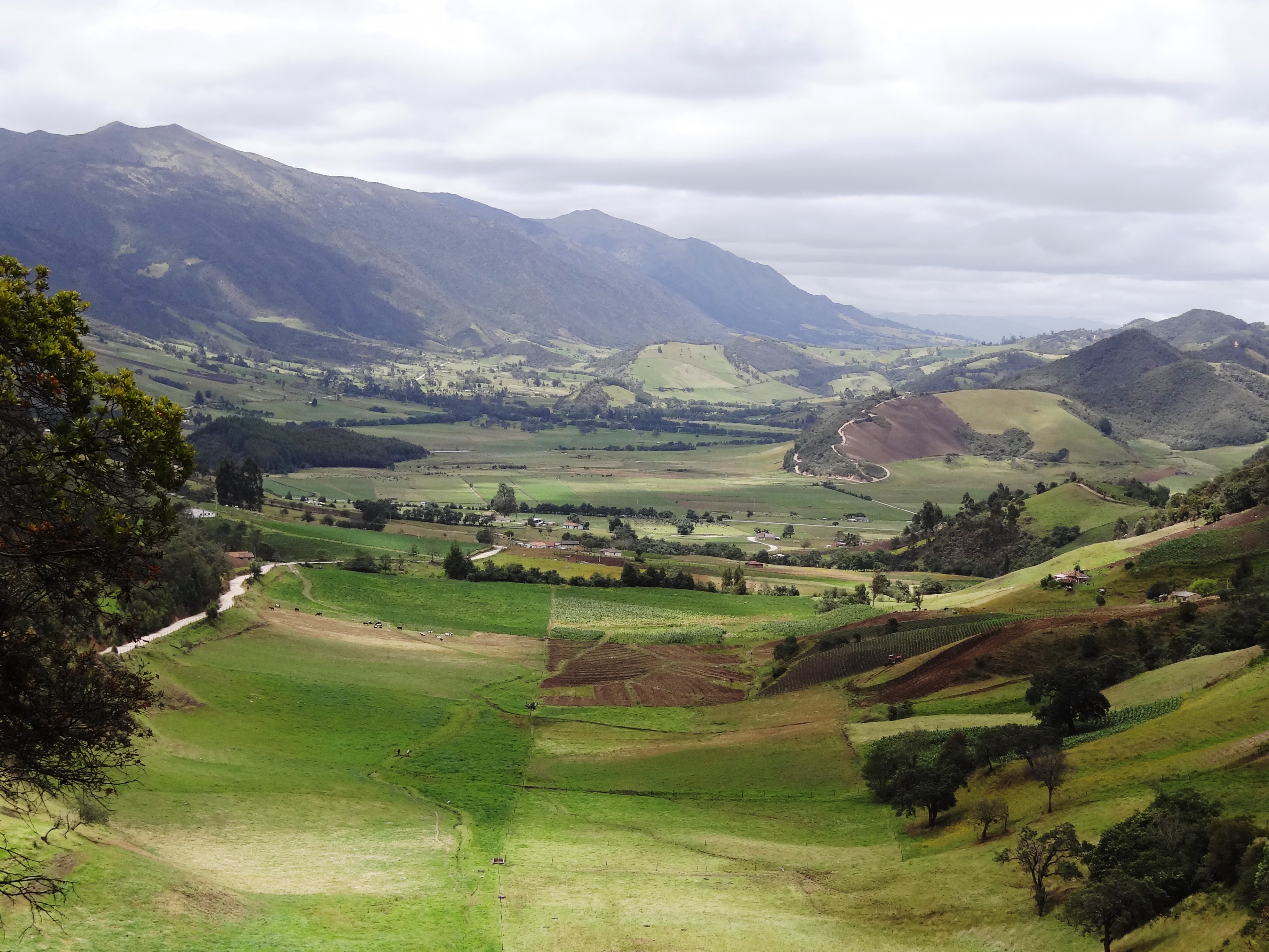 Paisaje rural Arcabuco (vereda Quirvaquira) y Cómbita (vereda Santa Bárbara), en inmediaciones al Santuario de Flora y Fauna de Iguaque, departamento de Boyacá, Colombia.